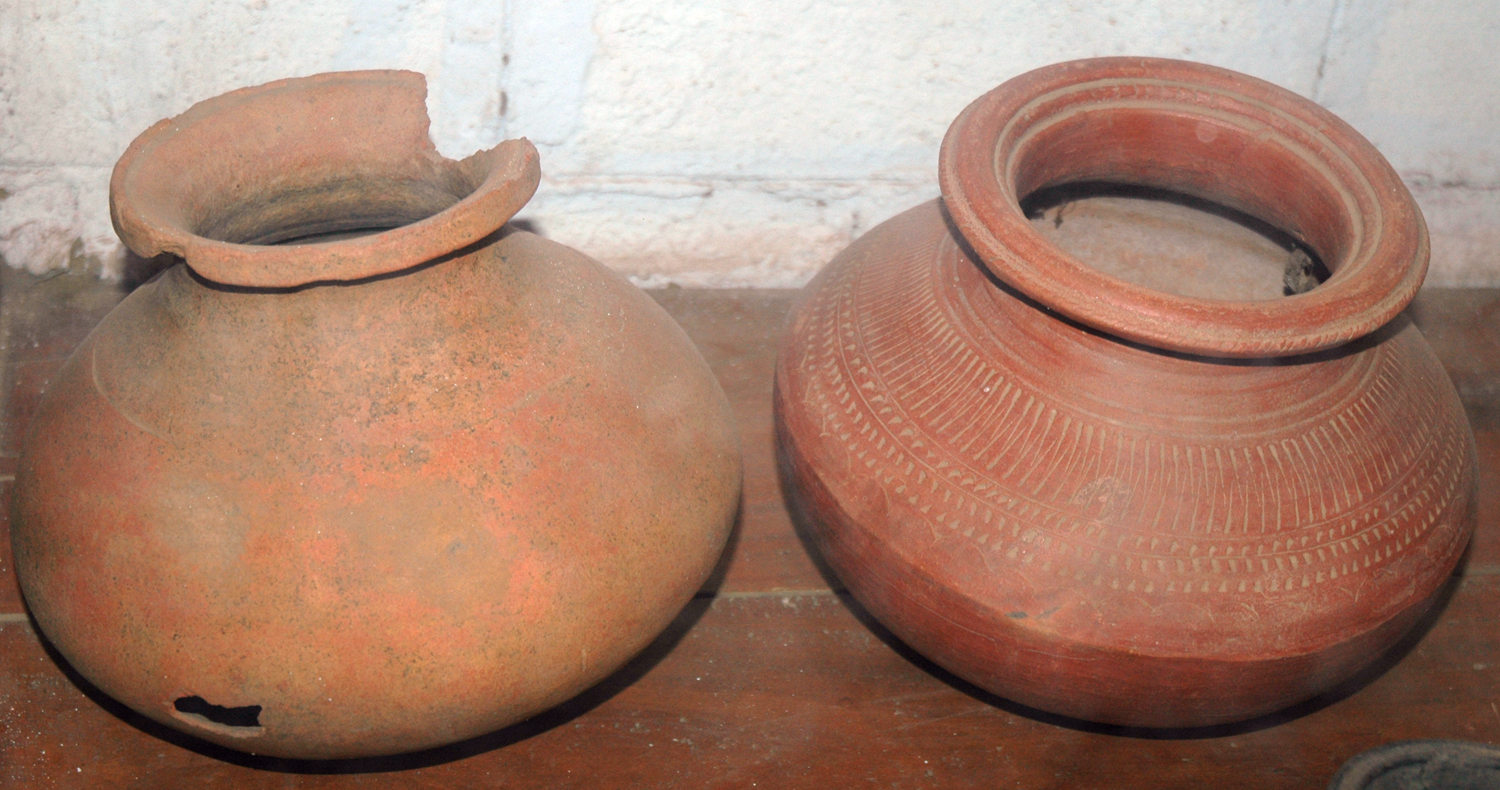 மண் பானைகள் - தொல் பொருட்காட்சிச்சாலை, யாழ்ப்பாணம்